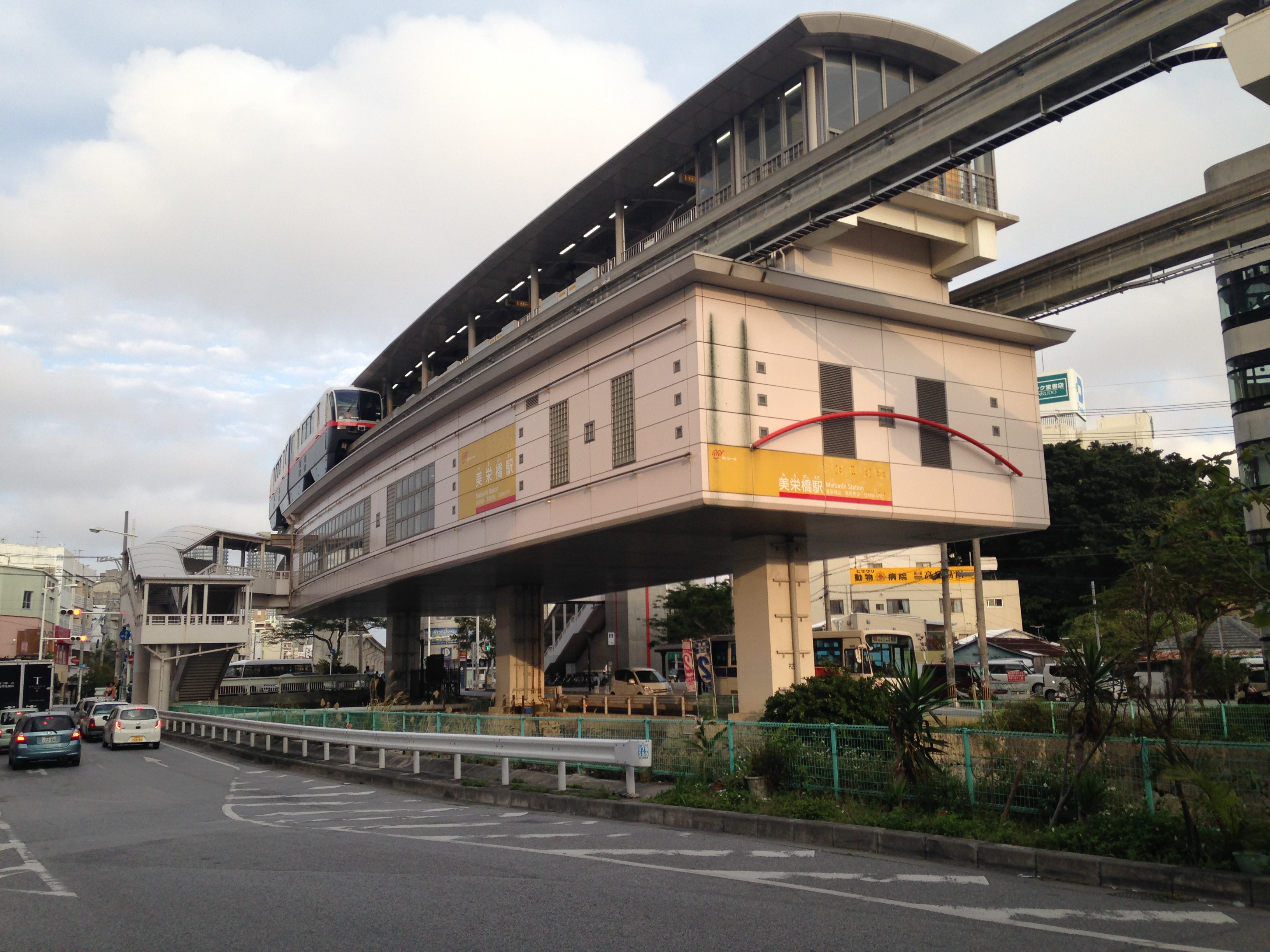 美栄橋駅駅舎